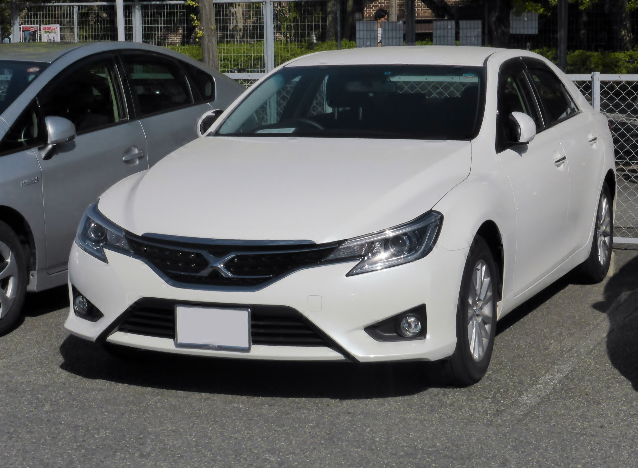 GRX130型トヨタ・マークX 250Gをフロントから撮影。